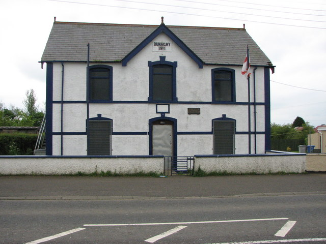 Dunaghy Independent Orange Hall